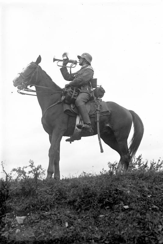 Die ersten grossen diesjährigen Herbstmanöver der Reichswehr in Ostpreussen ! Reichswehr-Trompeter unserer Kavallerie gibt ein Signal für die manöverierenden Truppen.